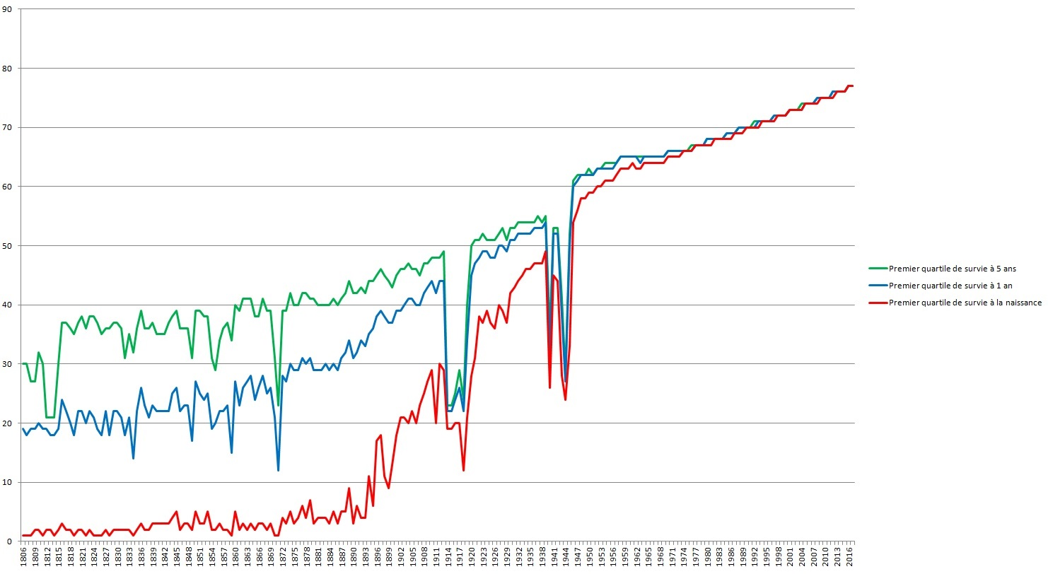 Évolution du premier quartile de survie en France de 1806 à 2017 (Source: INED) Définitions: - Premier quartile de survie à la naissance: âge à partir duquel 25% de la population est morte. - Premier quartile de survie à 1 an: âge à partir duquel 25% de la population de la population ayant survécu à leur 1er anniversaire est morte. - Premier quartile de survie à 5 ans: âge à partir duquel 25% de la population de la population ayant survécu à leur 5ème anniversaire est morte.